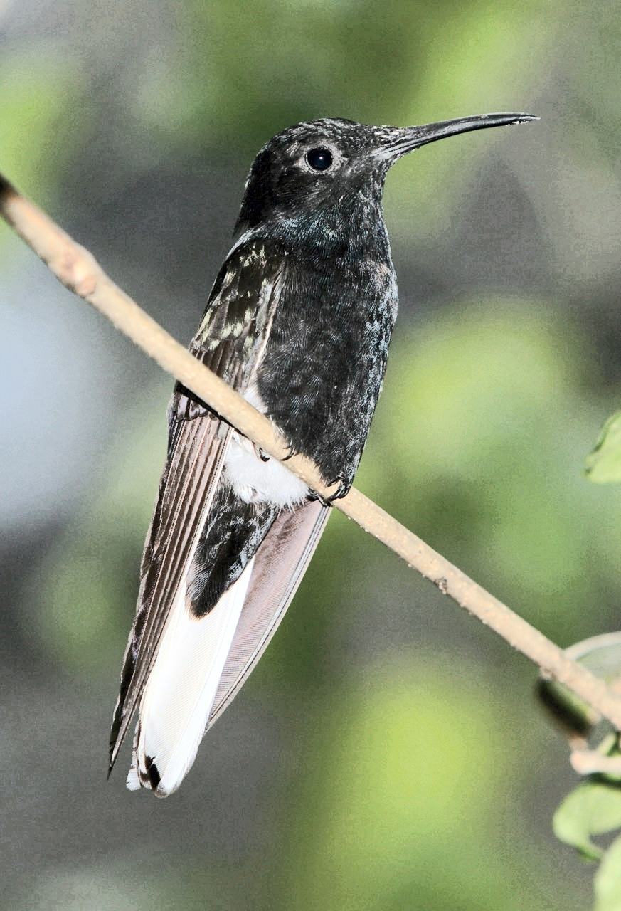 Black Jacobin (Florisuga fusca) Foz do Iguaçu, Brazil